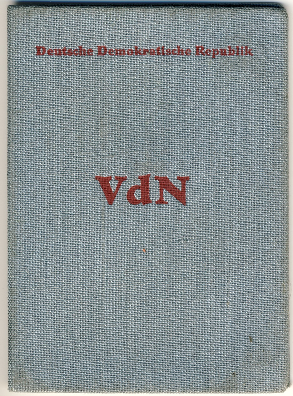 Mitgliedsausweis